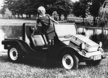 Automobil-Anwendungen in den 70ern